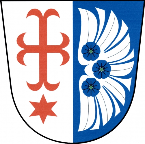 znak, Radkovice u Hrotovic, okres Třebíč